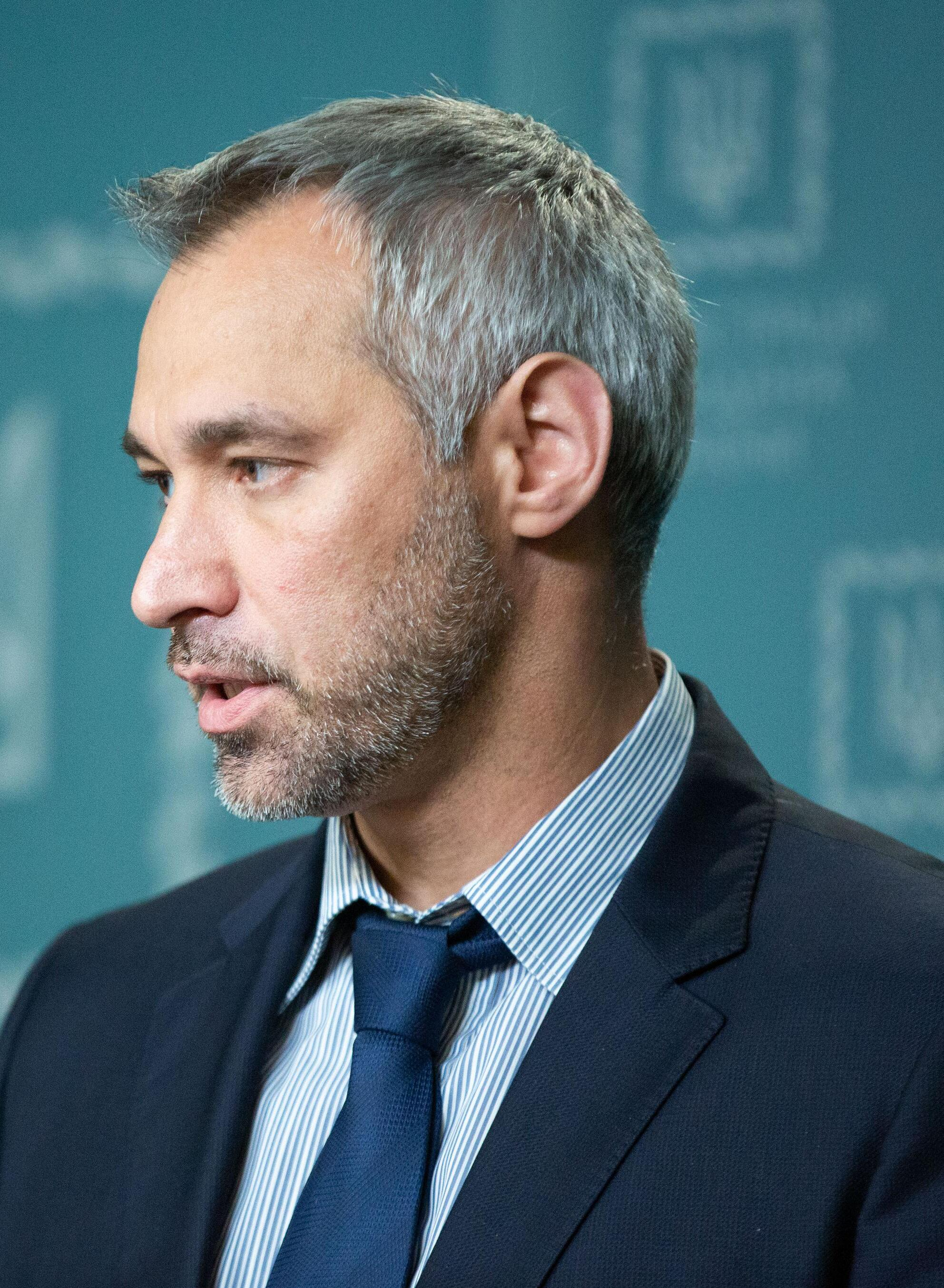 Руслан Рябошапка